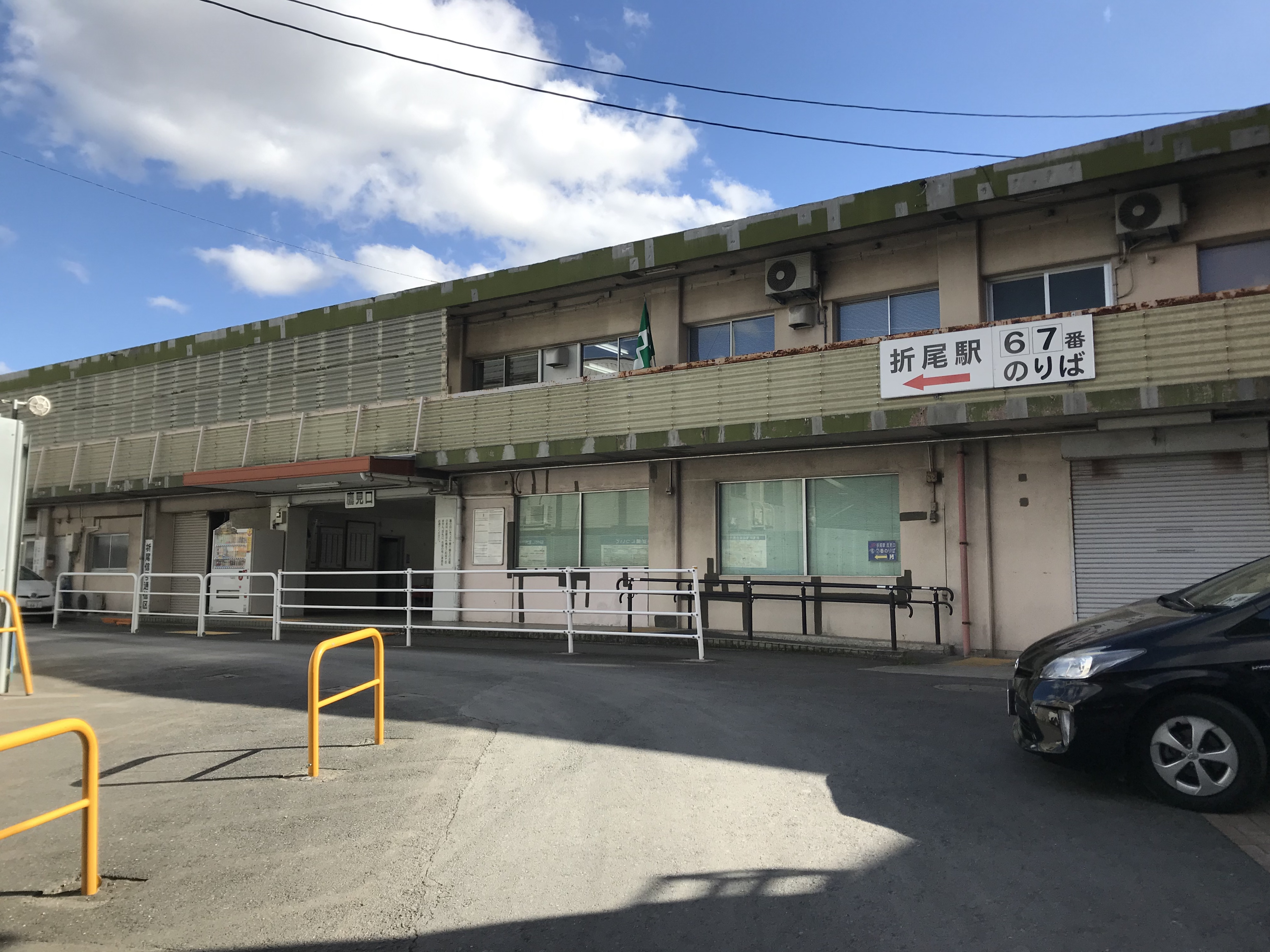 折尾駅鷹見口の駅舎